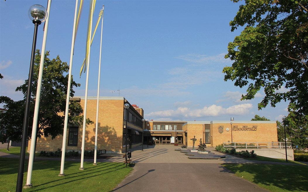 Leppävirran kunnantalo.